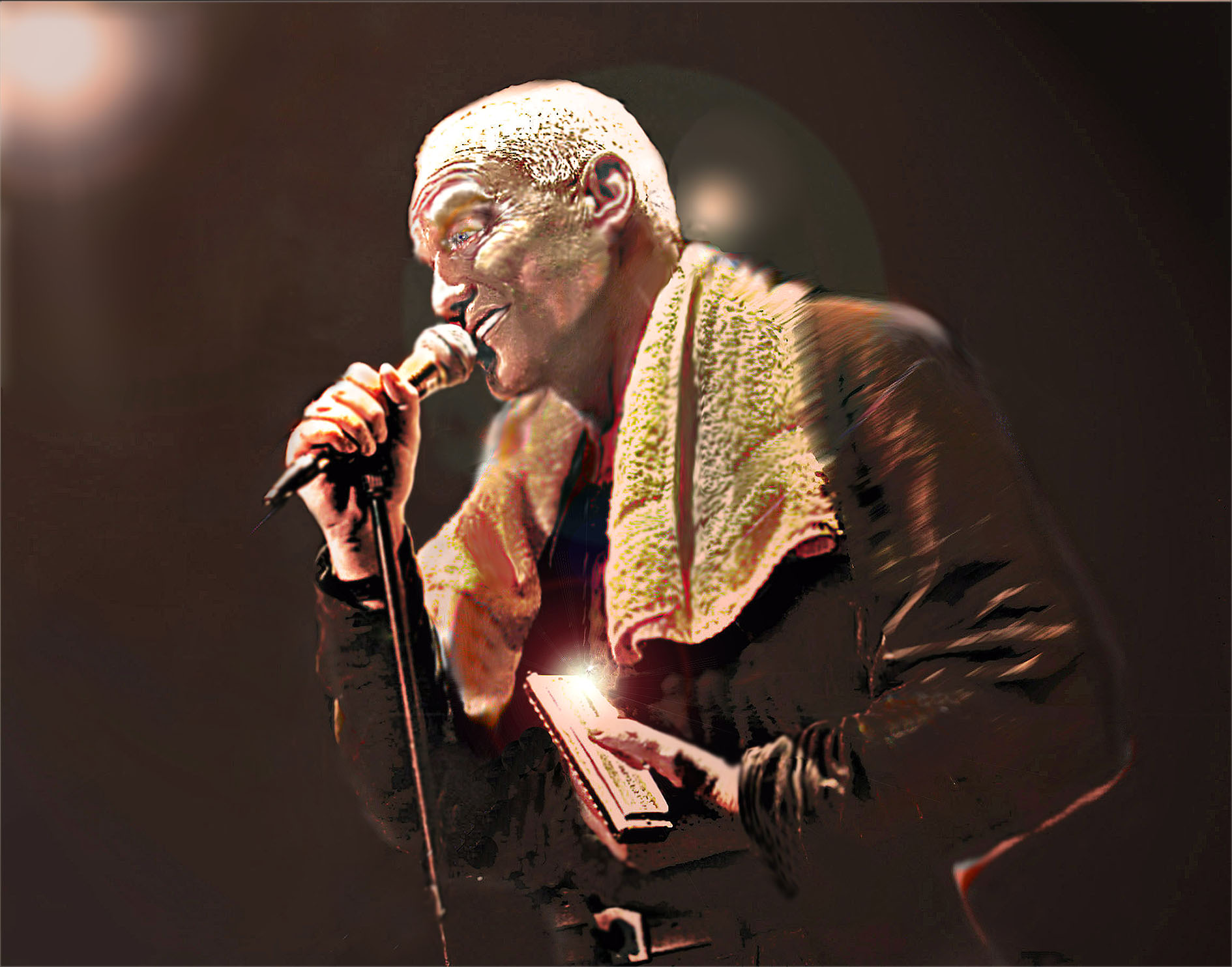 pressefoto